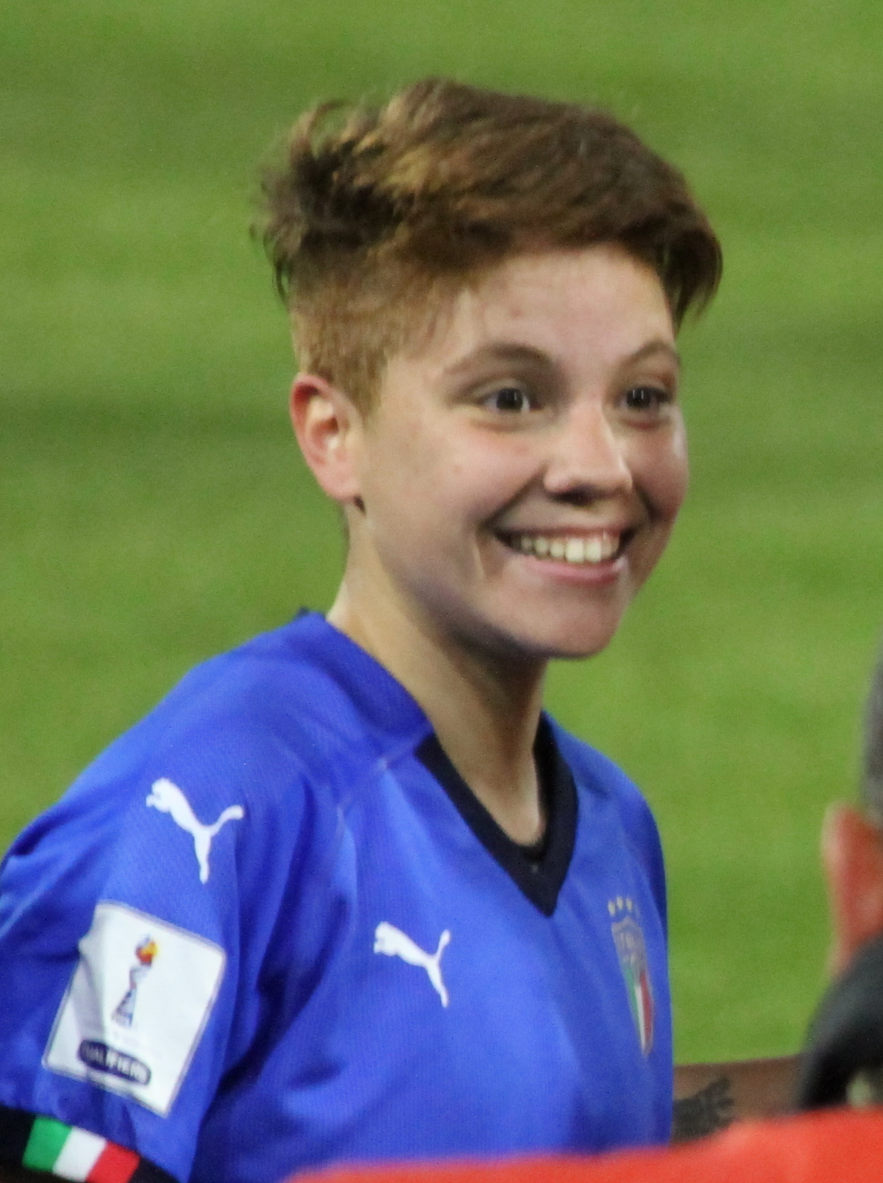 Manuela Giugliano, centrocampista della nazionale di calcio femminile dell'Italia, durante l'incontro Italia-Belgio del 10 aprile 2018 allo stadio Paolo Mazza di Ferrara.